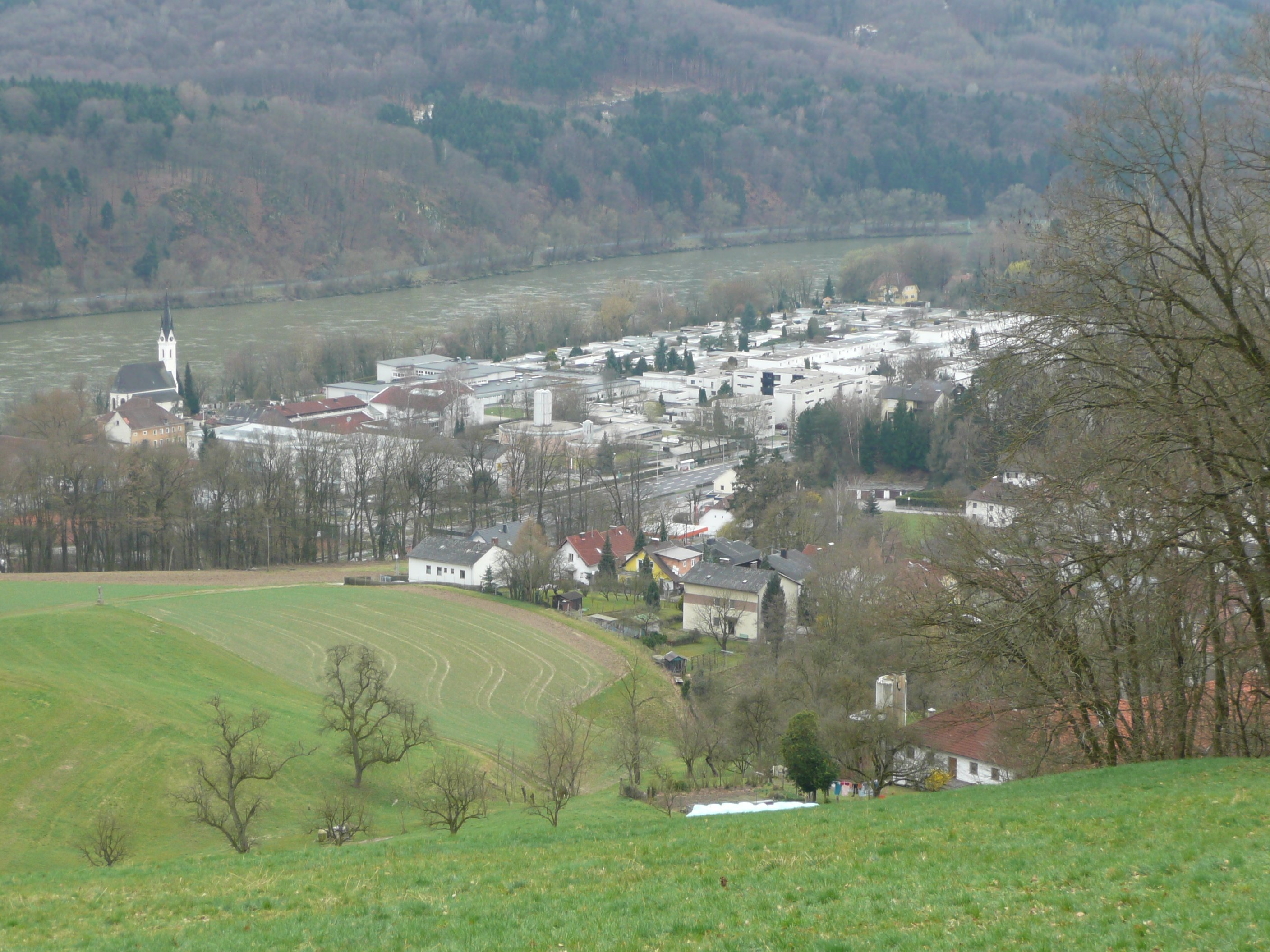 Blick auf Puchenau